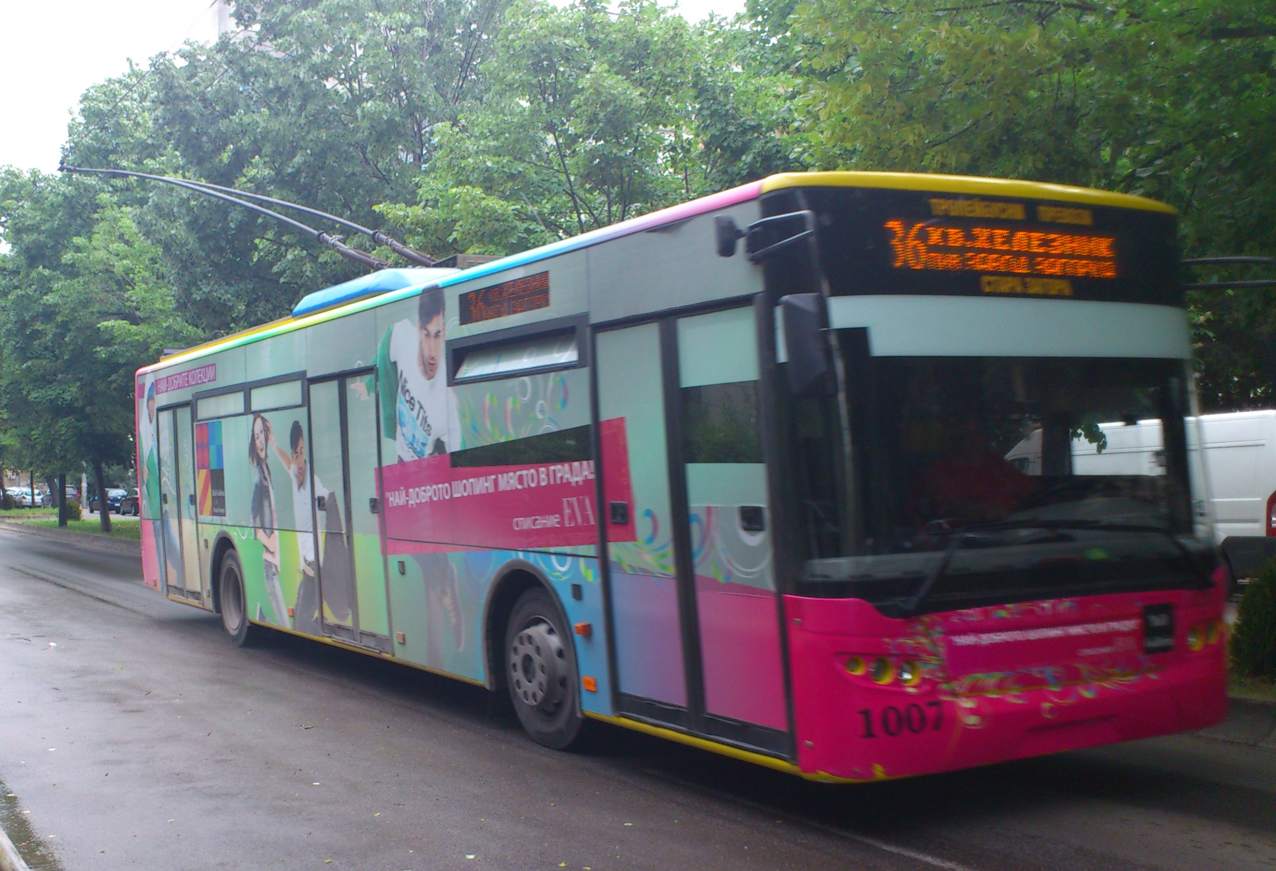 Тролейбус LAZ E183 в Стара Загора, България